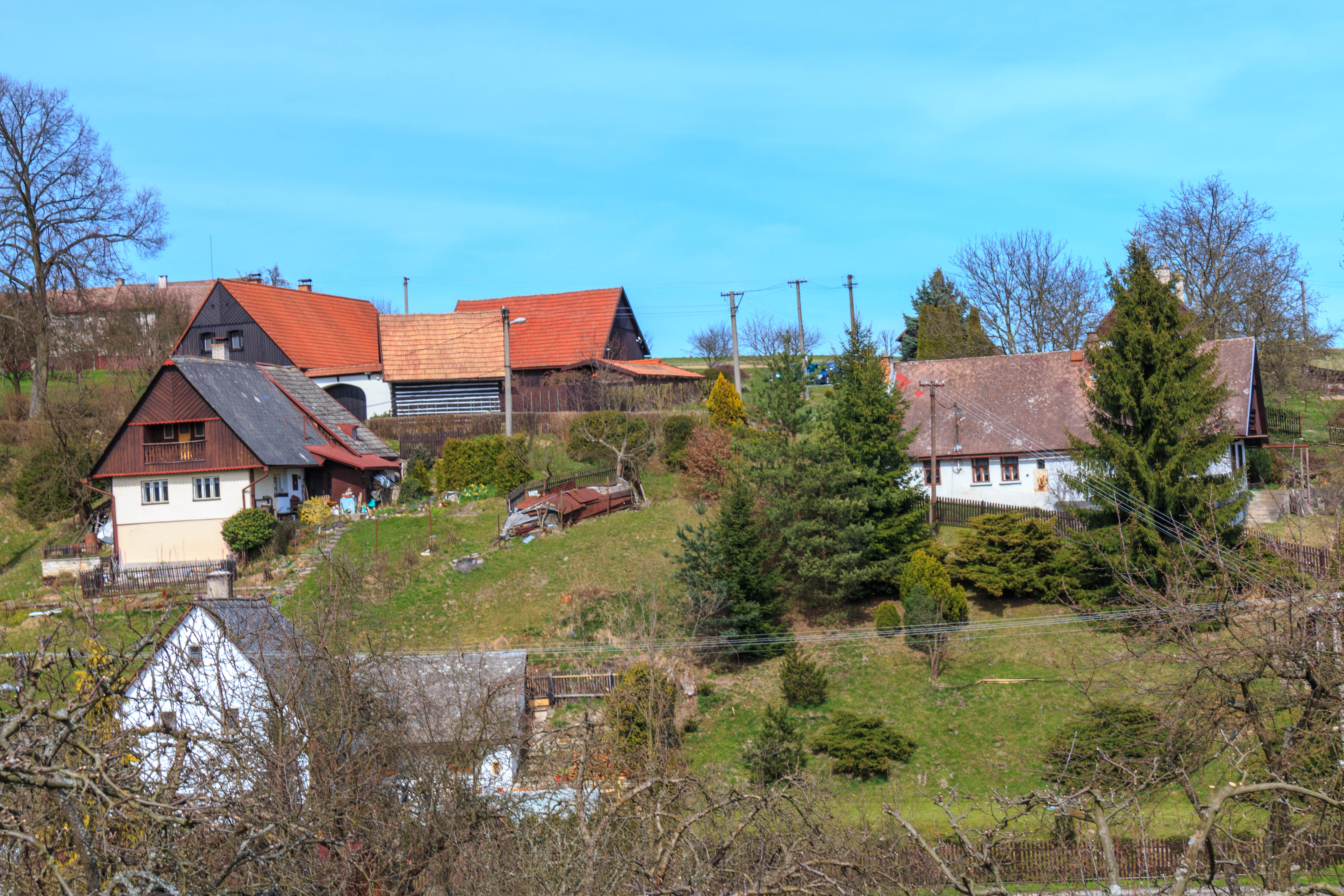 Litoboř čp. 75